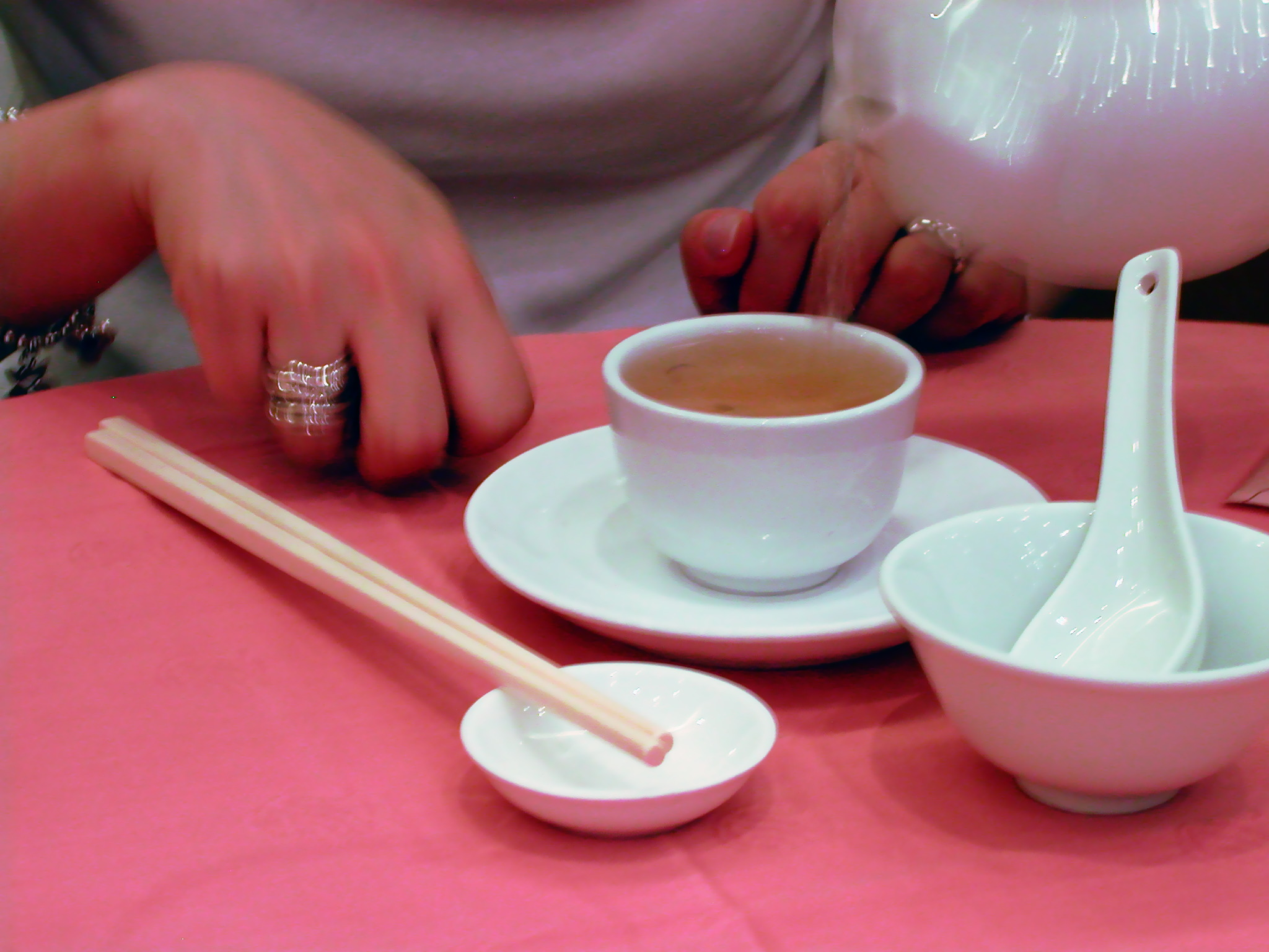 Yumcha finger tapping